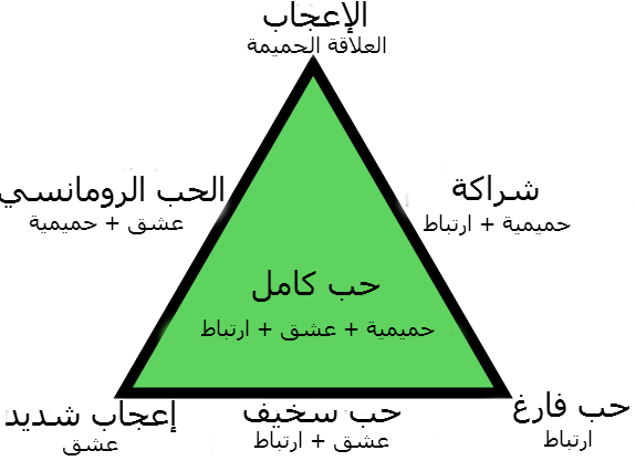 صورة تُظهر خصائص الحب الثلاث وكيف ينجم عنها 7 اشكال مُختلفة من الحب وفق هذه النظريَّة.